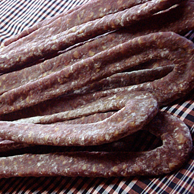 Embutido típico del Pirineo de Lleida